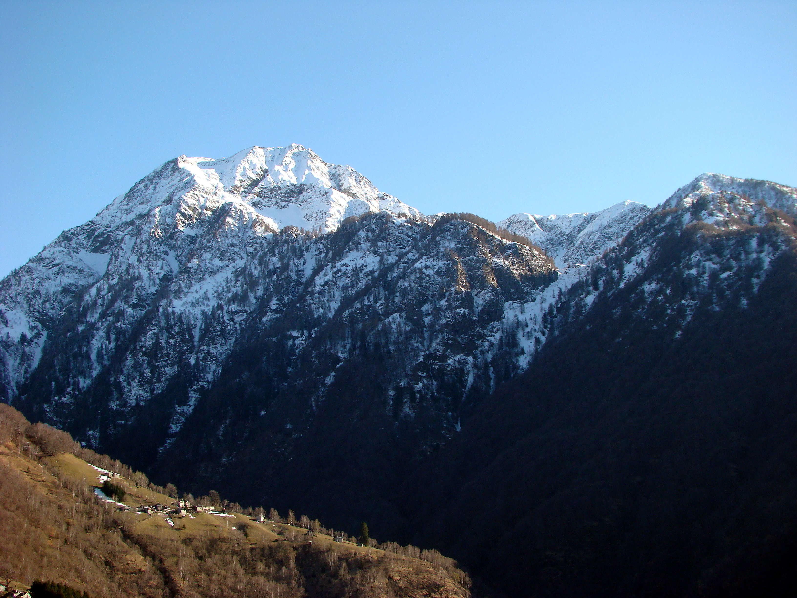 Monte Camoghè versante Nord